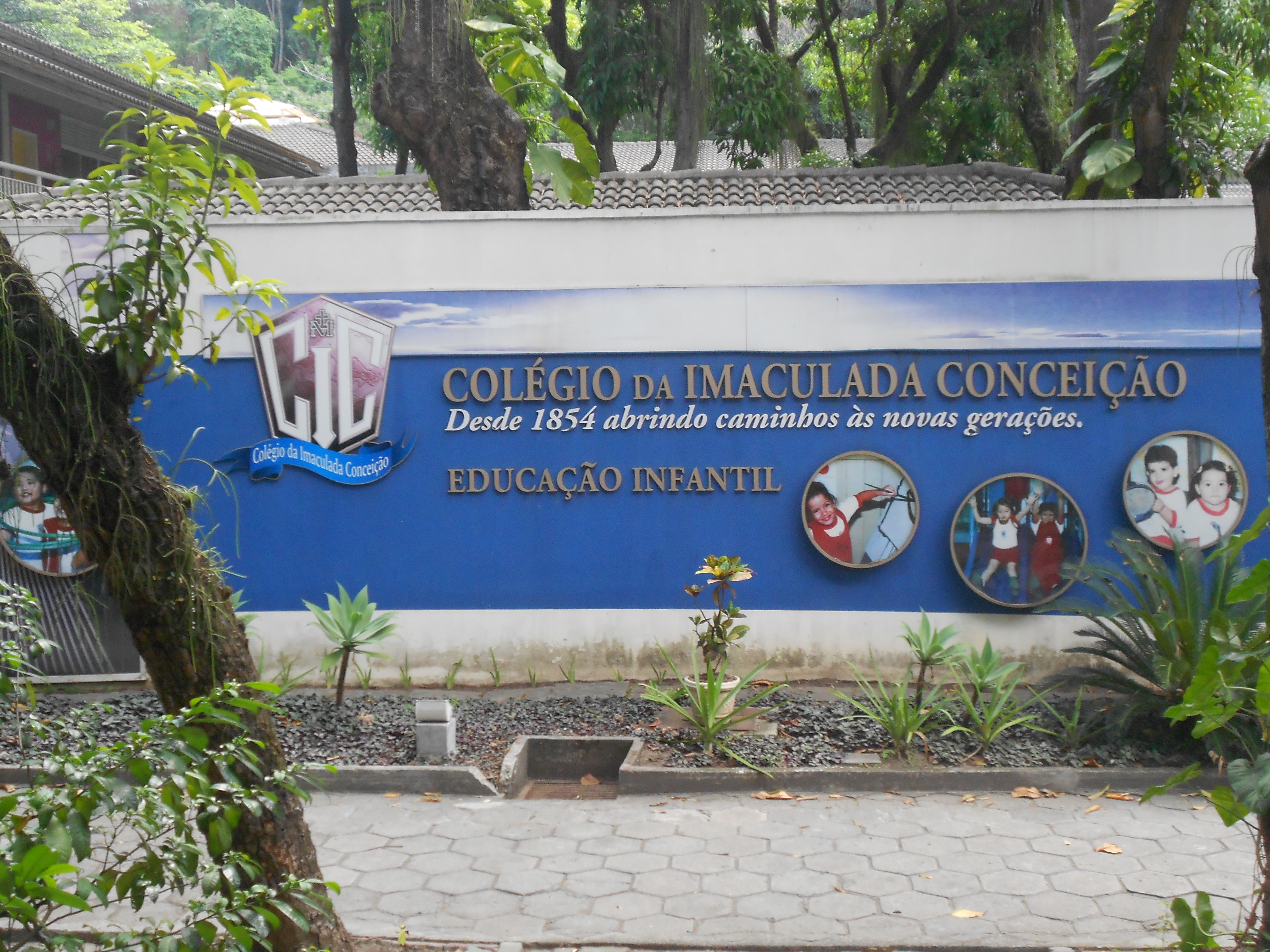 Colégio da Imaculada Conceição, situado na Praia de Botafogo, em Botafogo, Rio de Janeiro, Brasil.